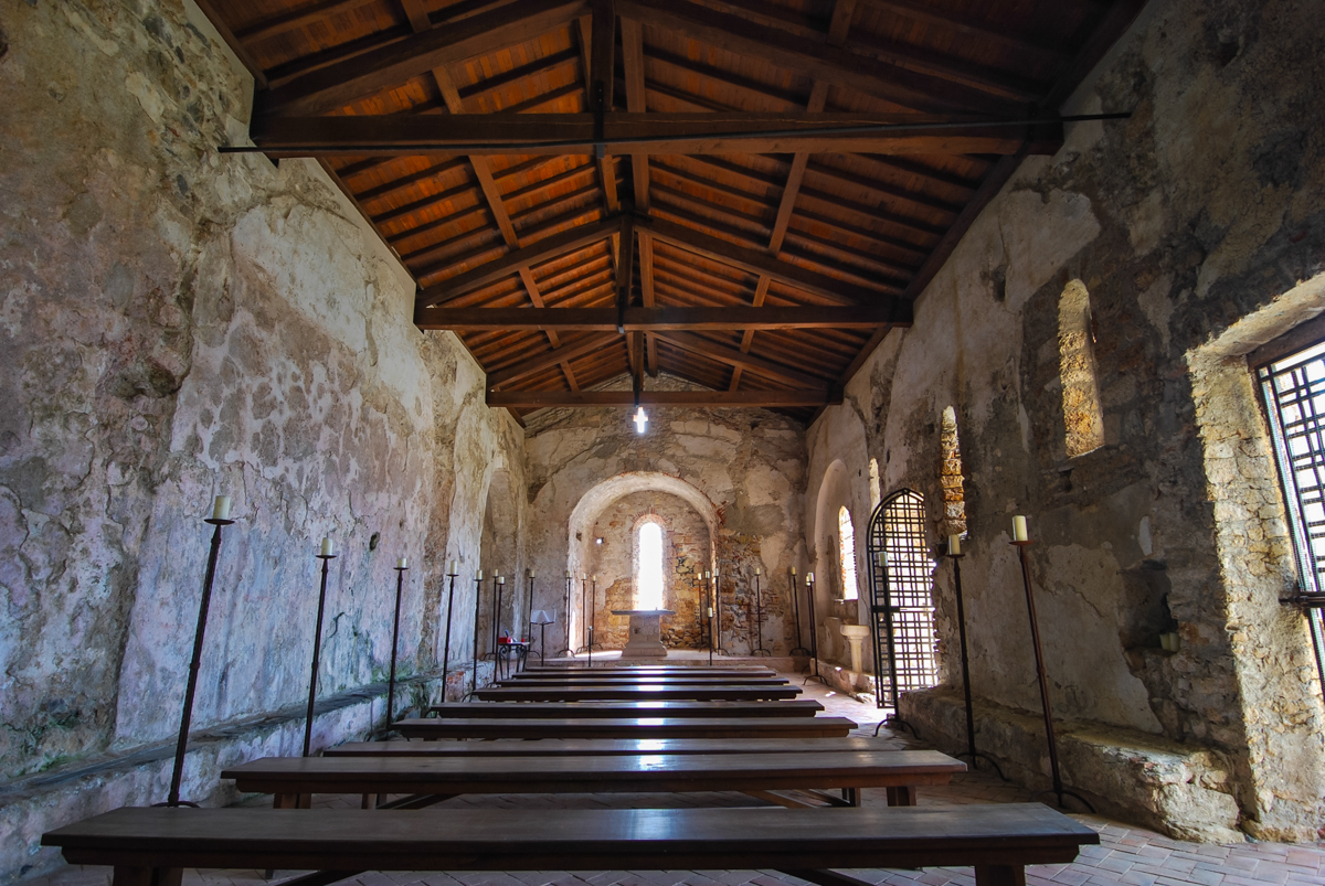 Chiesa Medioevale di San Lorenzo - Veduta dell'interno This is a photo of a monument which is part of cultural heritage of Italy.